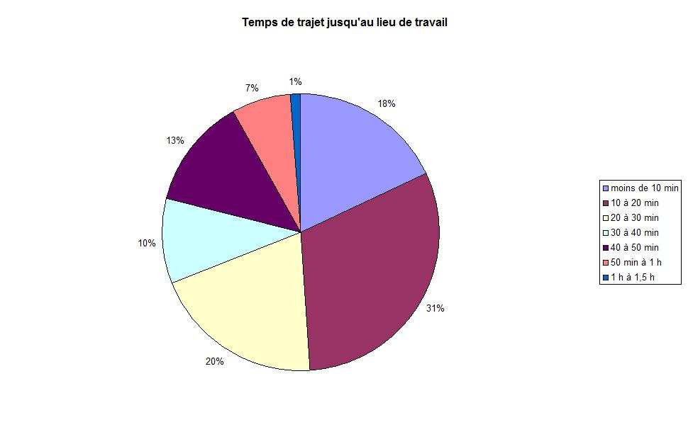 Temps de trajet jusqu'au lieu de travail pour les habitants de Dudley (Gé&orgie, Etats-Unis)